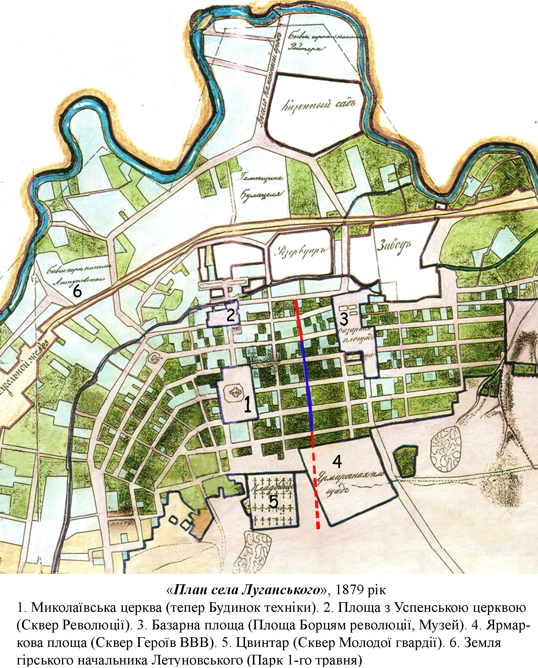 Карта улицы Демехина в 1879 году.